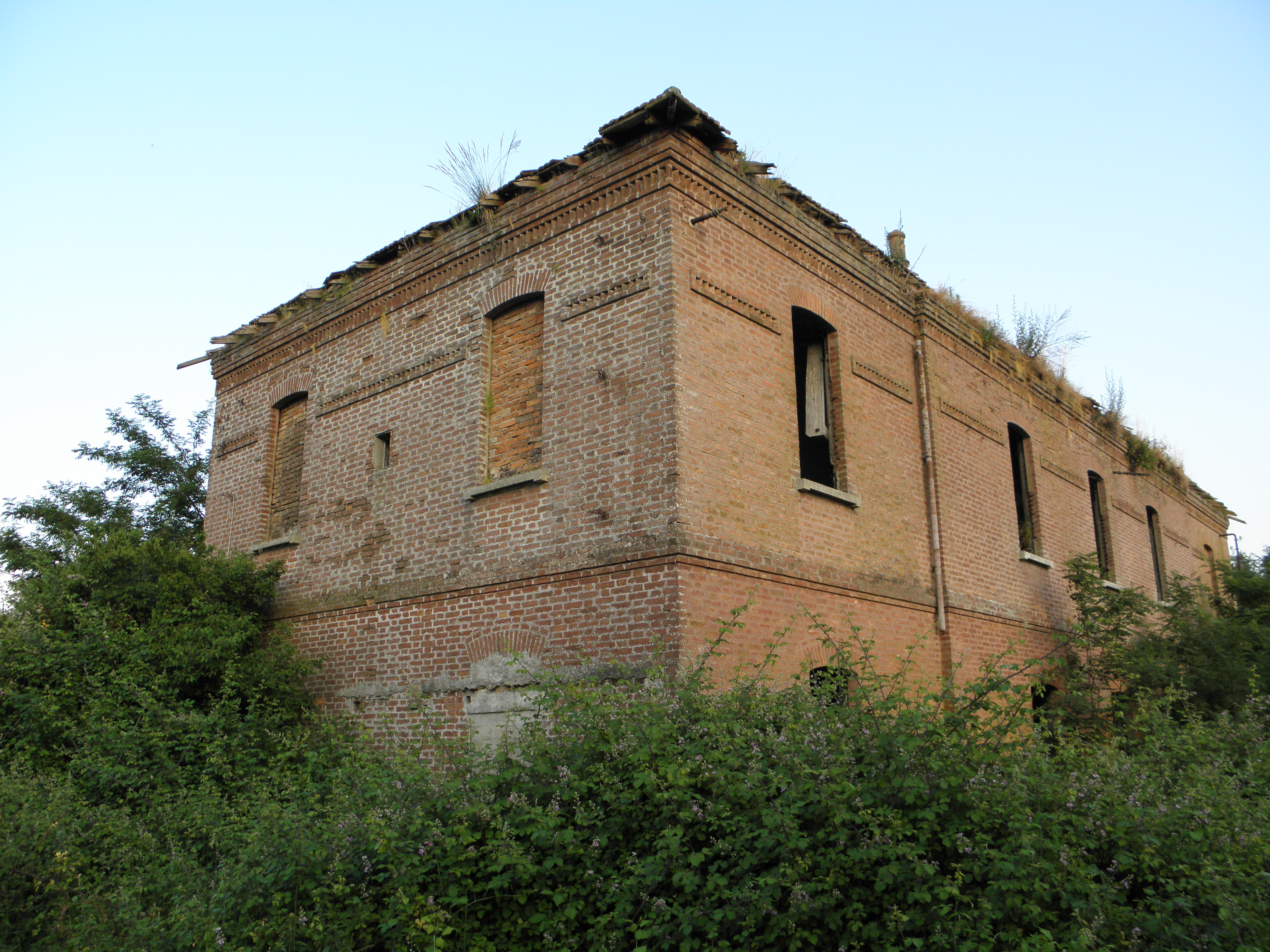 Ariano nel Polesine: i ruderi del fabbricato viaggiatori della stazione ferroviaria oramai dismessa.